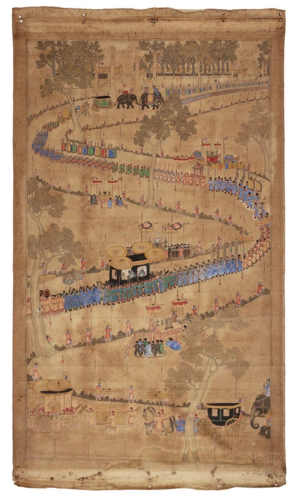 Peinture verticale à l'encre et couleurs sur toile, représentant la cérémonie du «Nam Giao», culte rendu au ciel et à la terre par le souverain d'Annam, une des plus importantes cérémonies rituells de la dynastie des N'guyen. Elle est figurée sous forme d'une longue procession rythmée d'éléphants et calèches, se dirigeant vers le tertre du Nam Giao.